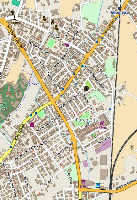 Quartiere di San Francesco - Parco Città a Vicenza